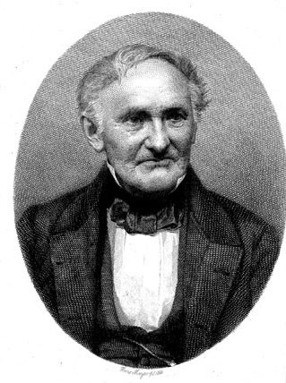 Engraved portrait of Johannes Karl Hartwig Schulze by Hans Meyer, from: Conrad Varrentrapp: Johannes Schulze und das höhere preussische Unterrichtswesen in seiner Zeit, Leipzig, Teubner, 1889